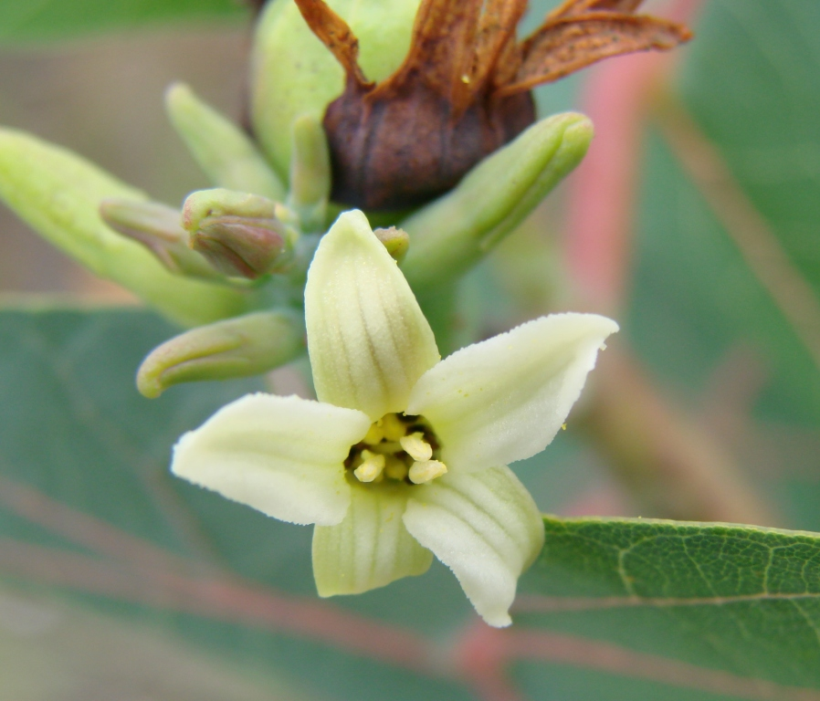 Manihot peltata - EUPHORBIACEAE Parque Nacional da Chapada dos Veadeiros - Cavalcante - Goiás - Brasil.